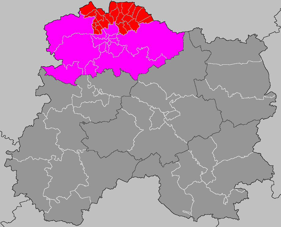 Localisation du canton de Bourgogne